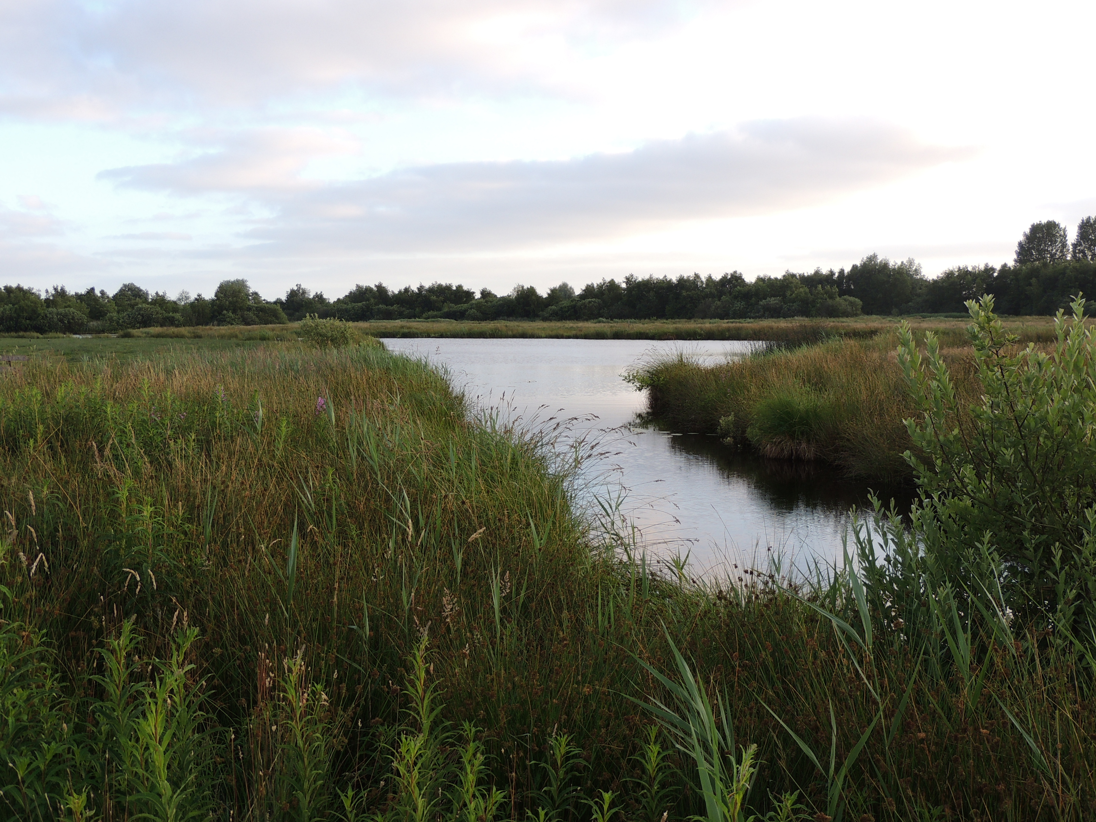 De Alde Feanen This is a photo or sound file made in De Alde Feanen National Park in the Netherlands, with the main subject of the file in the category: landscapes